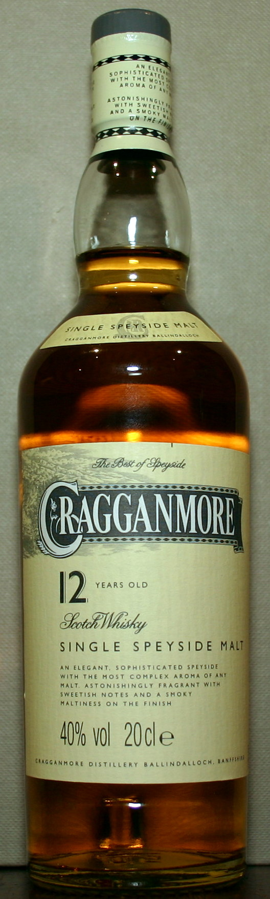 Cragganmore Single Malt Speyside Scotch Whisky 12 years old